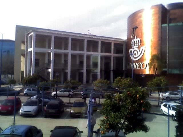 Correos y Telégrafos en Sevilla. Antiguo Pabellón de Puerto Rico de la Expo '92.